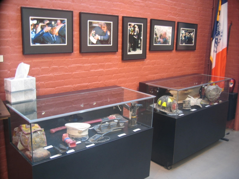 Salle en mémoire des pompiers victimes de leur devoir le 11 septembre 2001.